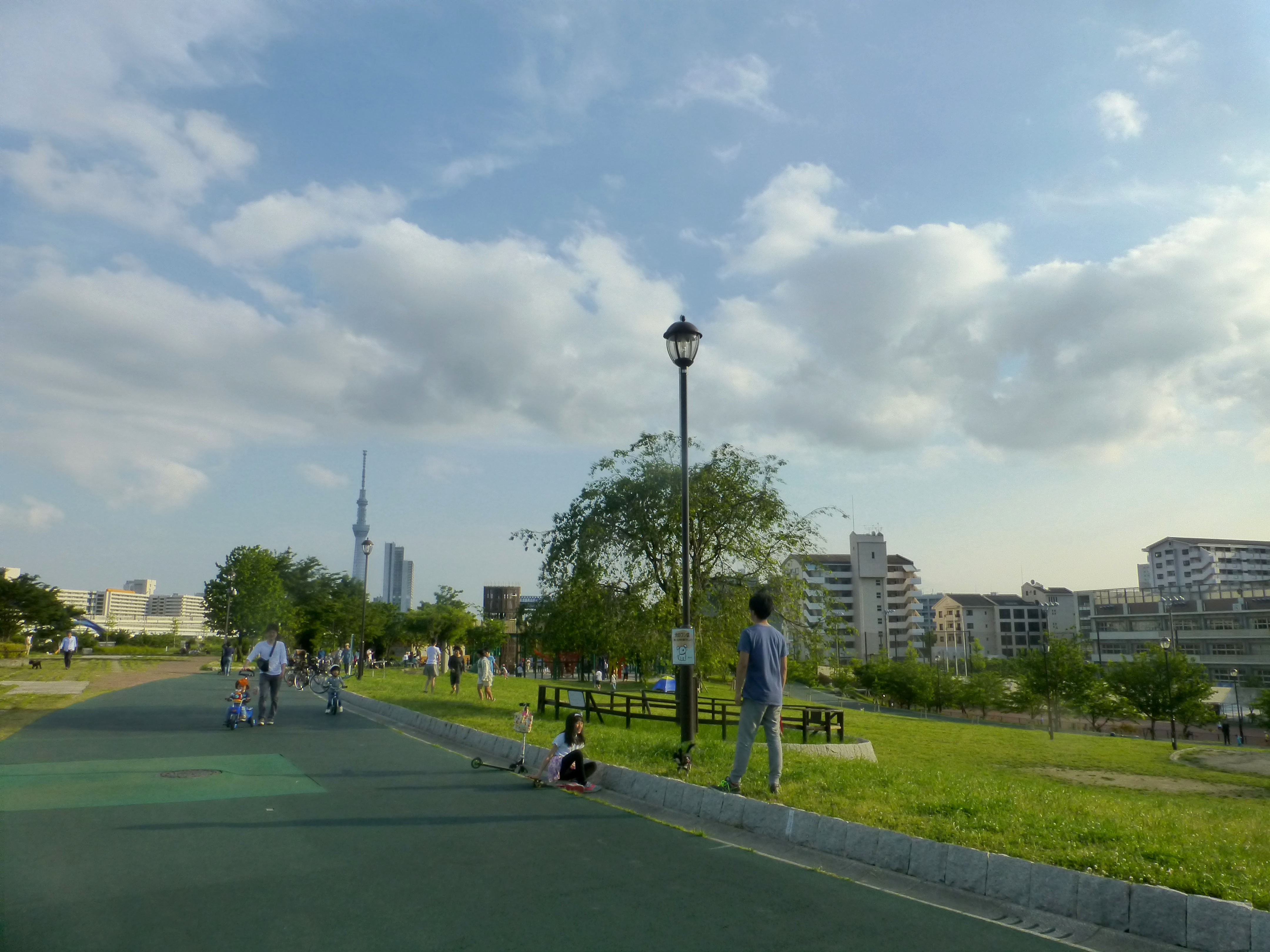 汐入公園 (Shioiri Park)